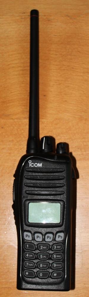 Icom IC-F3162DT, digitales Betriebsfunk Handgerät nach IDAS/NXDN standard, umschaltbar analog 12.5/25 kHz digital 6.25 kHz